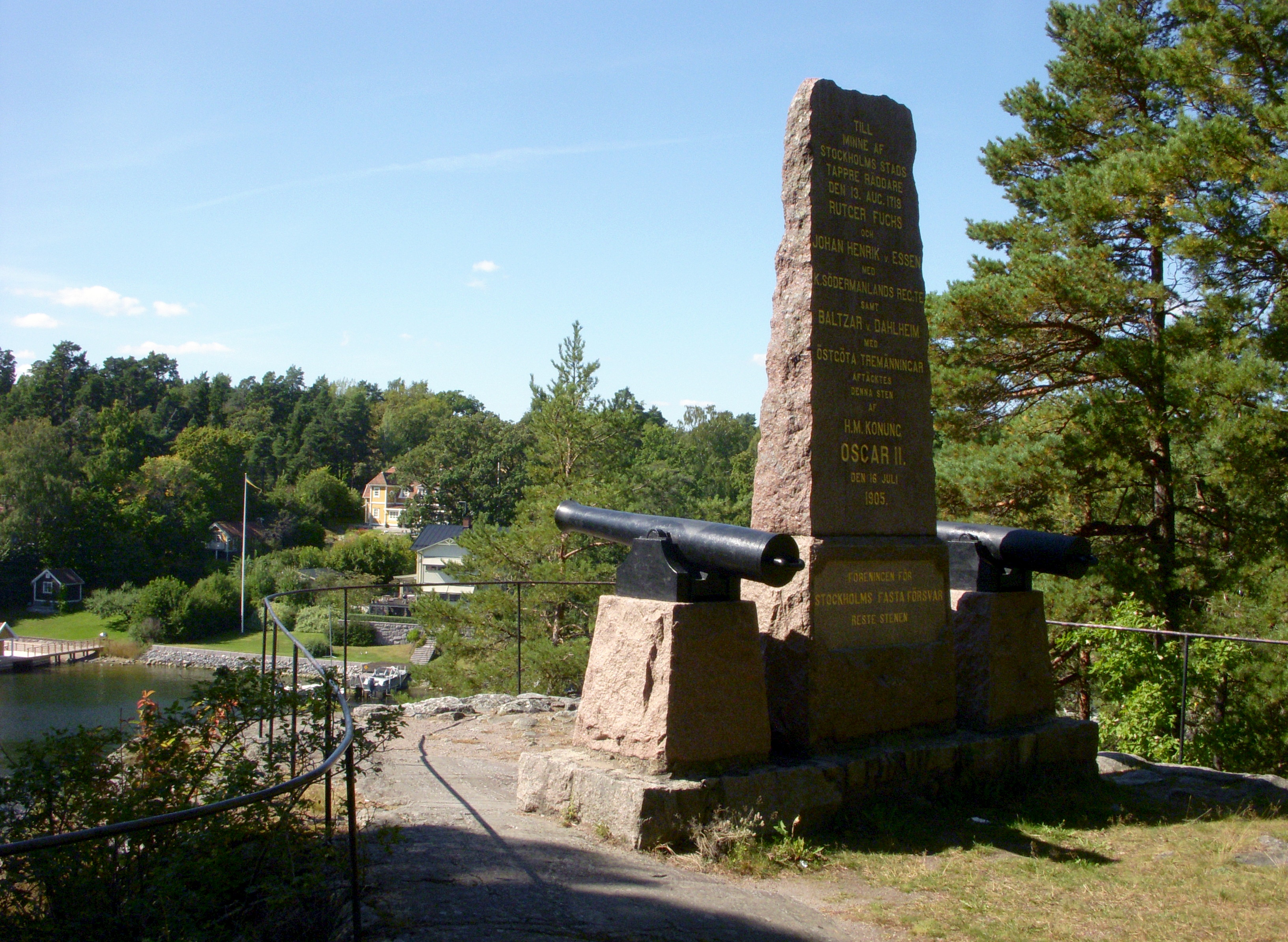 Skogsömonumentet